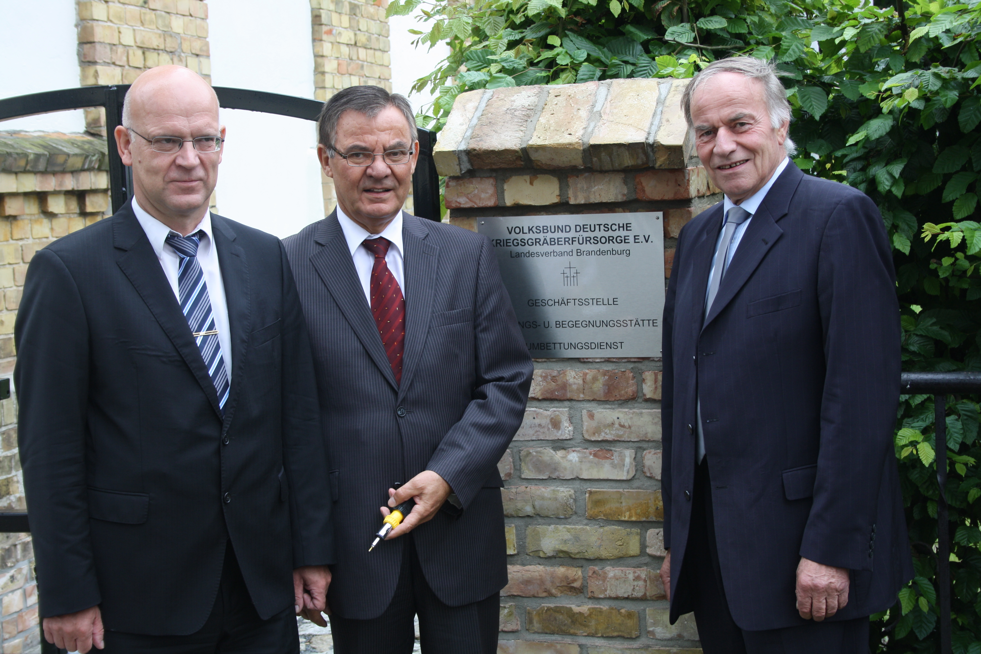 Landrat Stephan Loge, Volksbundpräsident Reinhard Führer und der Brandenburger Landtagspräsident Gunter Fritsch vor der Bildungsstätte in Halbe